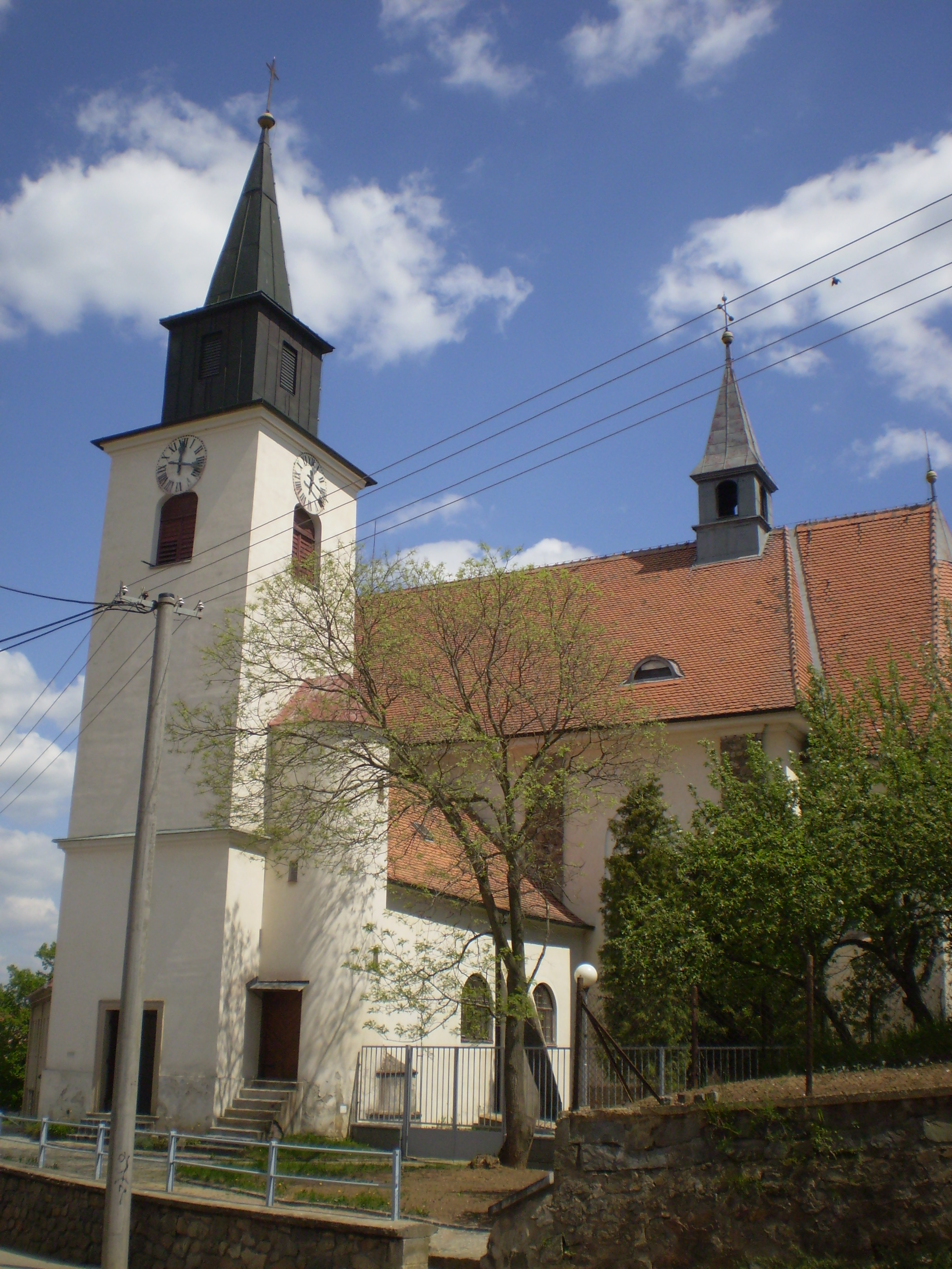 Kostel sv. Bartoloměje v Brně-Žebětíně.